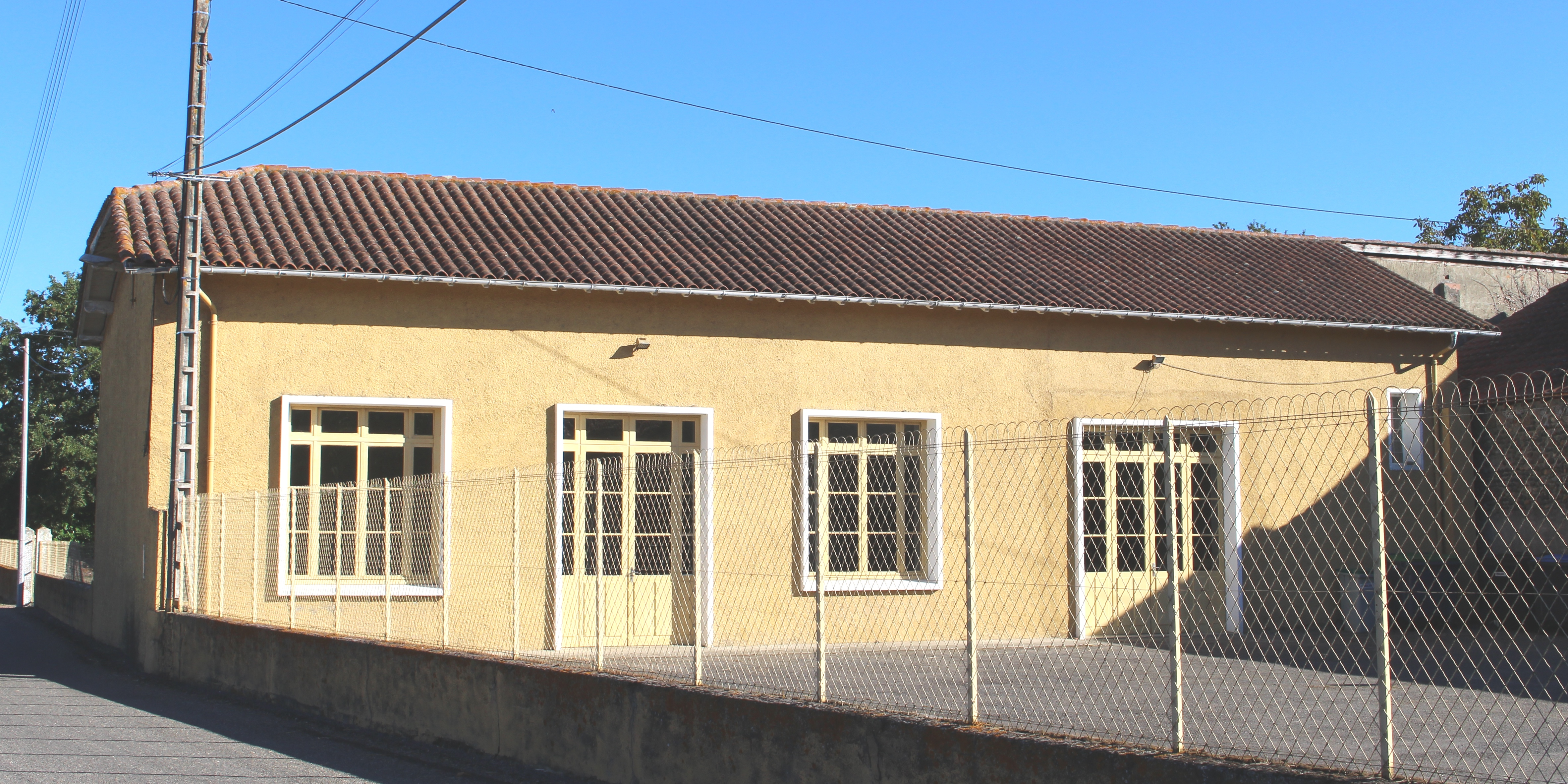 Salle des fêtes de Hères (Hautes-Pyrénées)